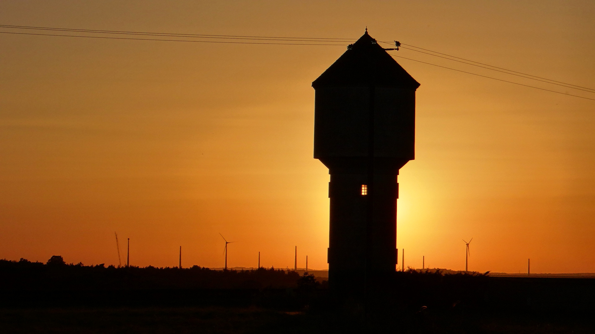 Château d'eau d'Annoux au coucher du soleil